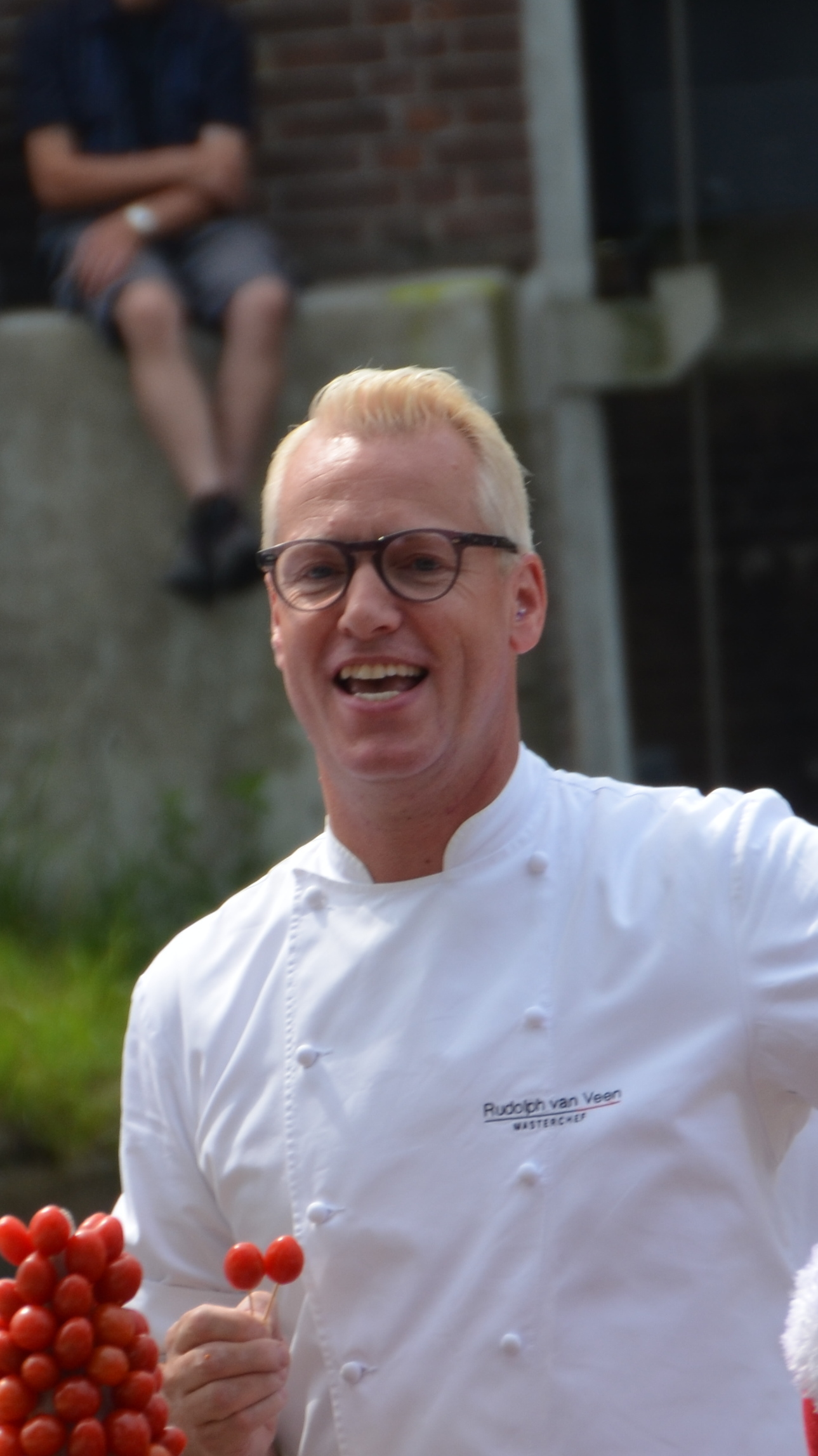 De topkok en TV-presentator Rudolph van Veen tijdens het Varend Corso Westland in 2015. Hij voer mee met de route in het kader van zijn nieuwe kookboek. De foto is op de grens van Rijswijk en Delft genomen. Op dit punt van de route varen de boten Delft binnen. Het Varend Corso Westland is een jaarlijks terugkerend evenement in de Nederlandse streek het Westland, waarbij met bloemen, planten, fruit en groente versierde boten over het water varen door de kernen van Westland, Midden-Delfland, Delft, Rijswijk, Den Haag, Vlaardingen en Maassluis. Het evenement duurt drie dagen en de route bedraagt 70 kilometer.